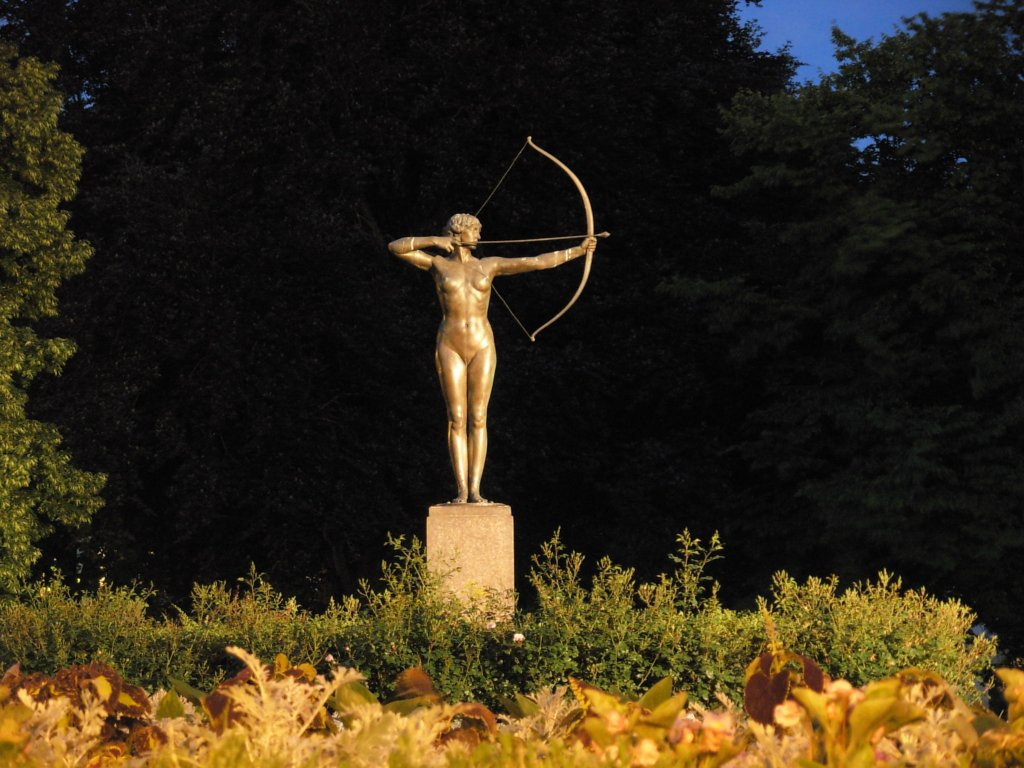 Pomnik Łuczniczki w Bydgoszczy